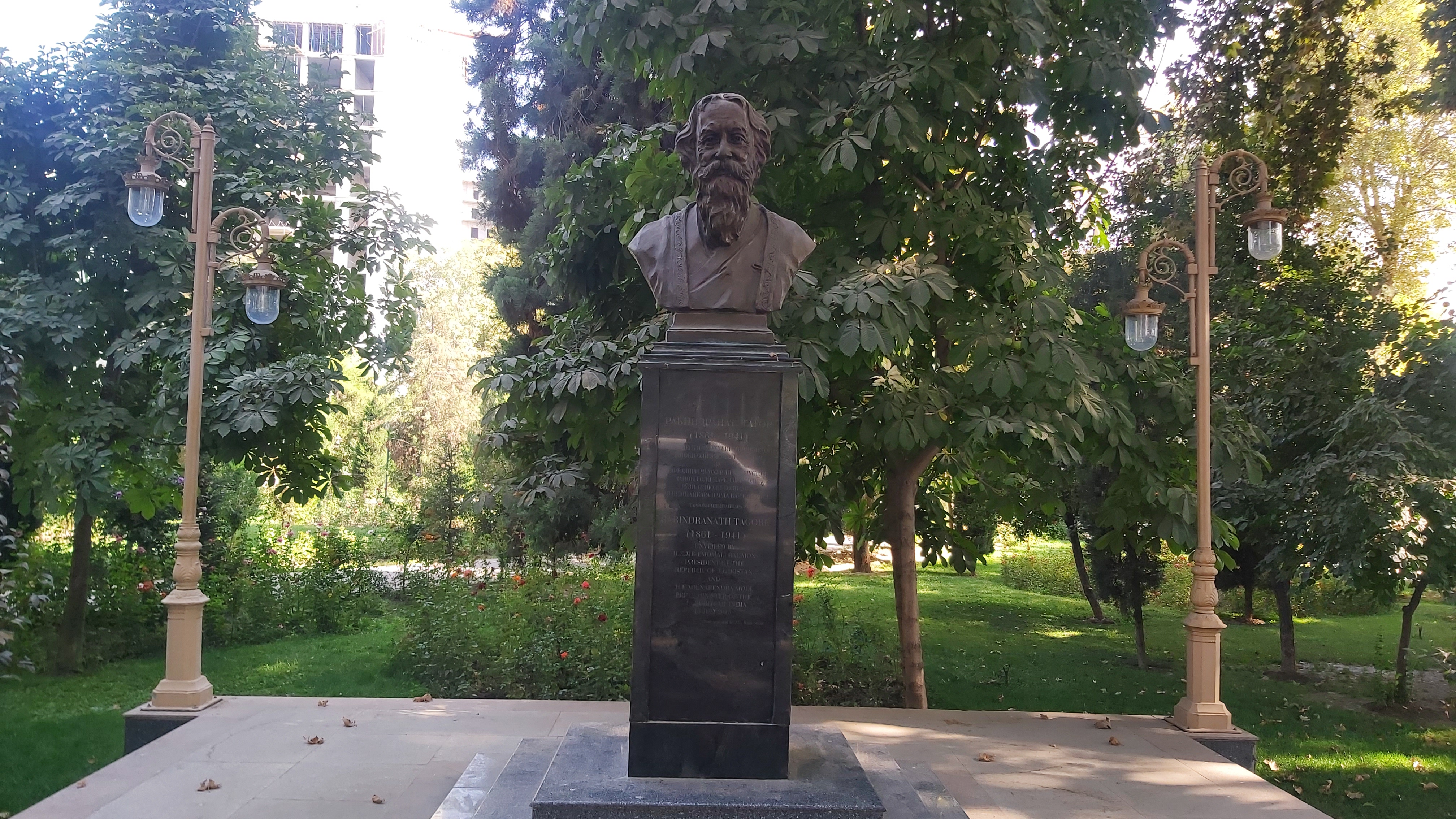 Памятник Рабиндранату Тагору в Душанбе